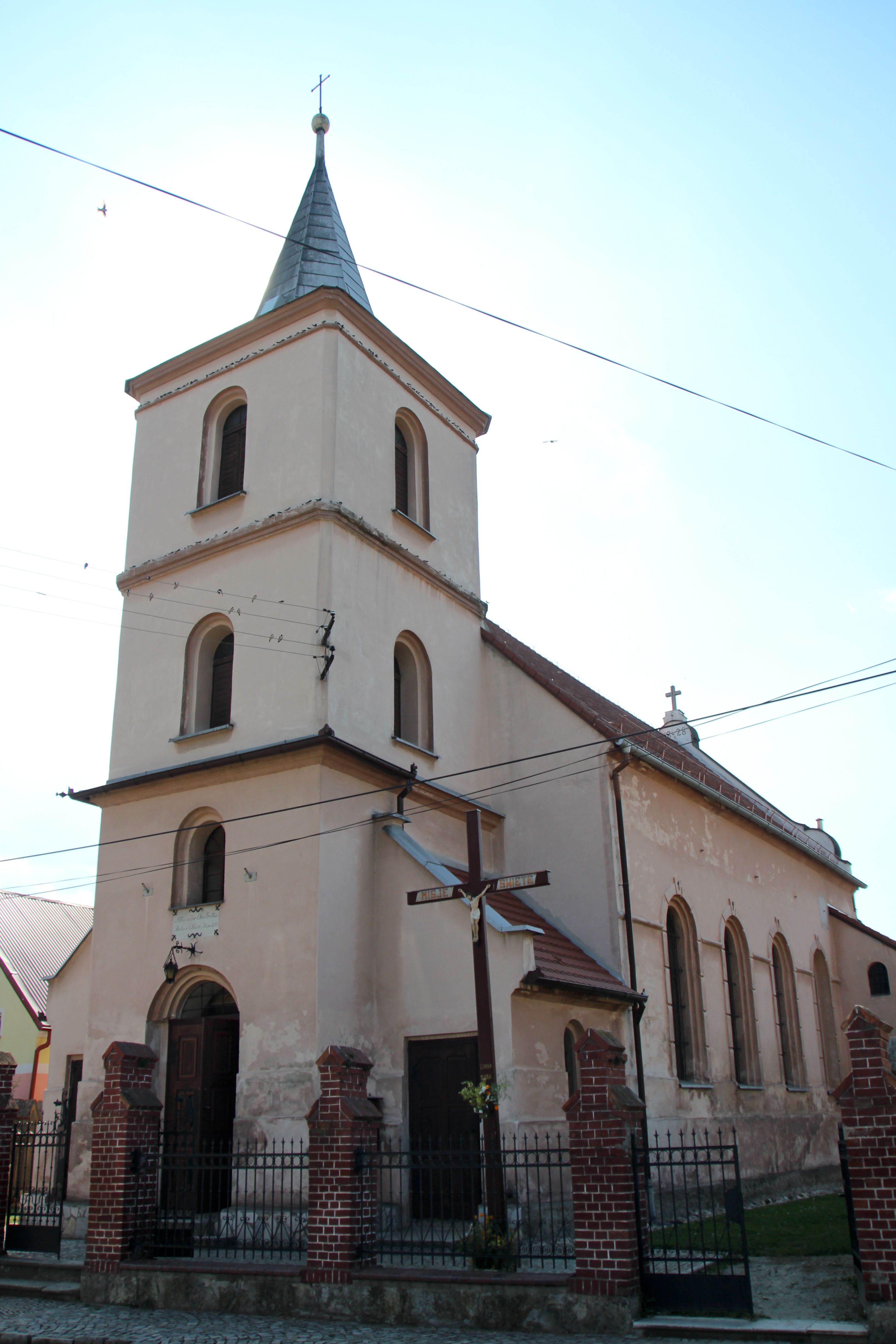 Wilamowa – rzymskokatolicki kościół filialny p.w. Matki Bożej Szkaplerznej, 1843